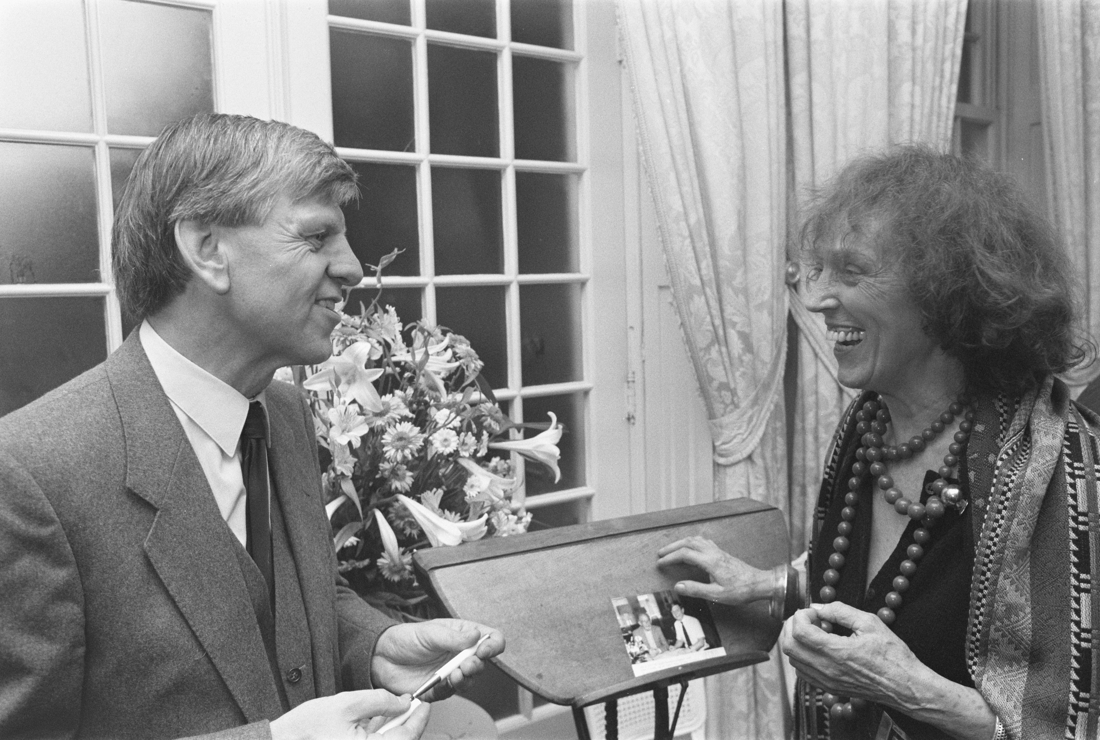 Presentatie Vestdijk-biografie; Hans Visser in gesprek Bibeb. 14 november 1987